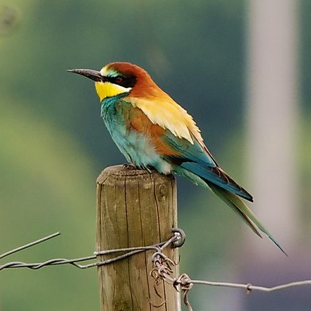 Bienenfresser; aufgenommen im Kaiserstuhl